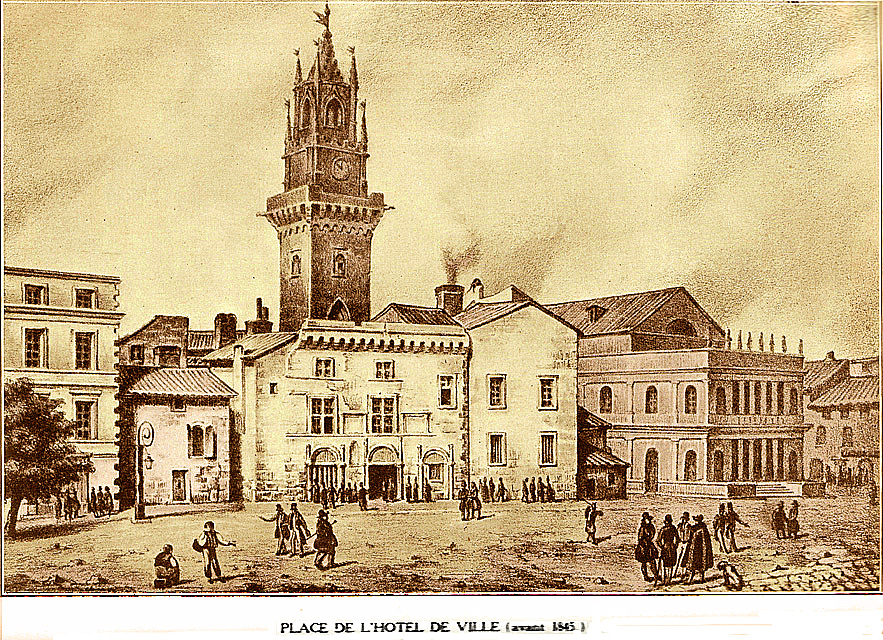 Lithographie de la place de l'Hôtel de Ville réalisée avant 1845